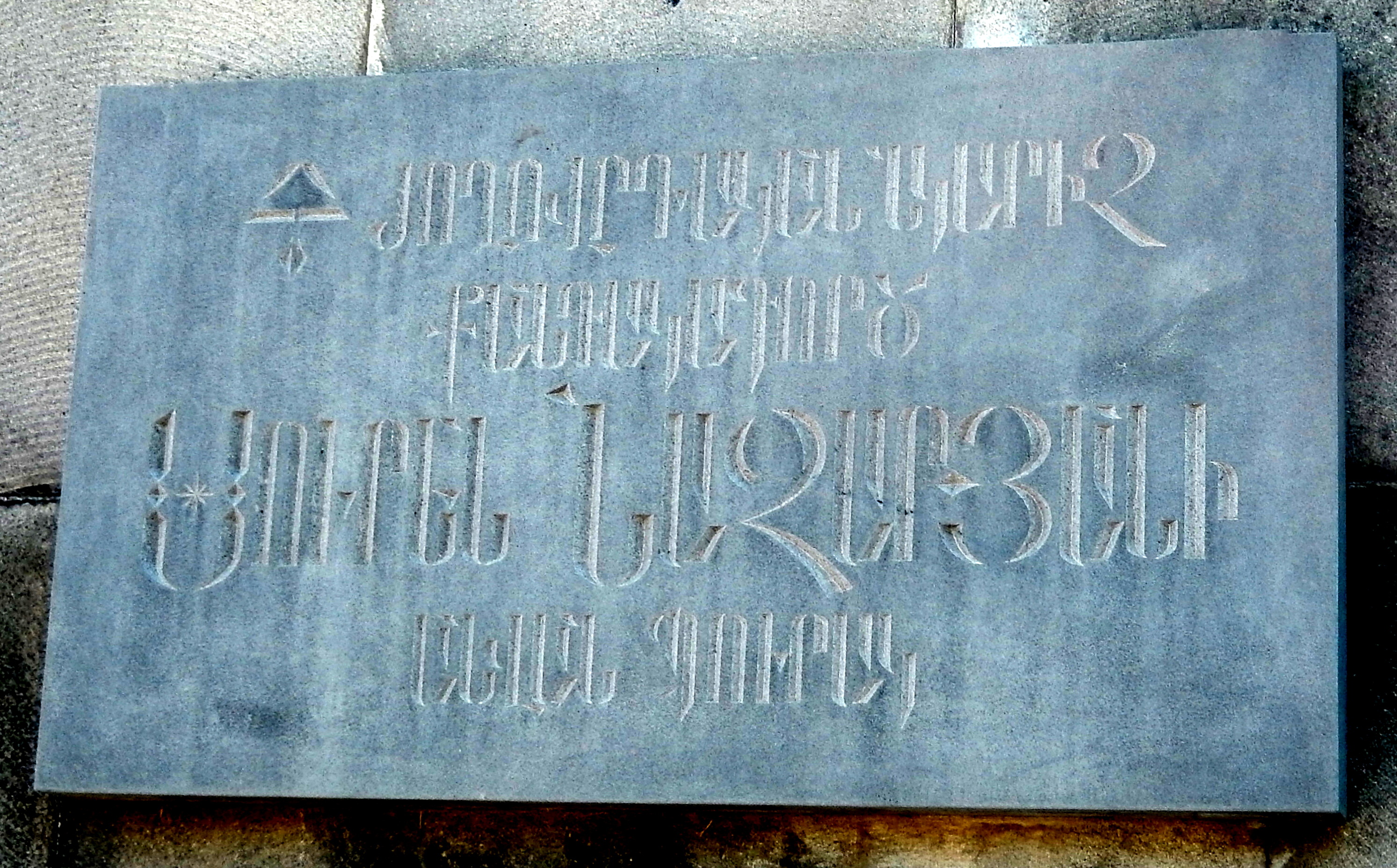 Սուրեն Նազարյանի անվան ապուրակ